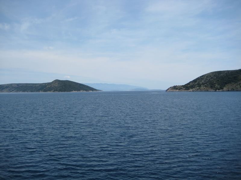 Kanal Krušija (Plavnik/Cres), Croatia